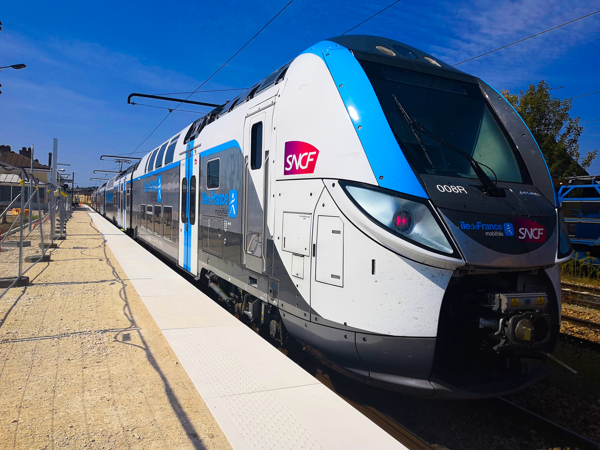 Z 57000 Regio 2N en livrée Île-de-France Mobilités en gare de Montereau.